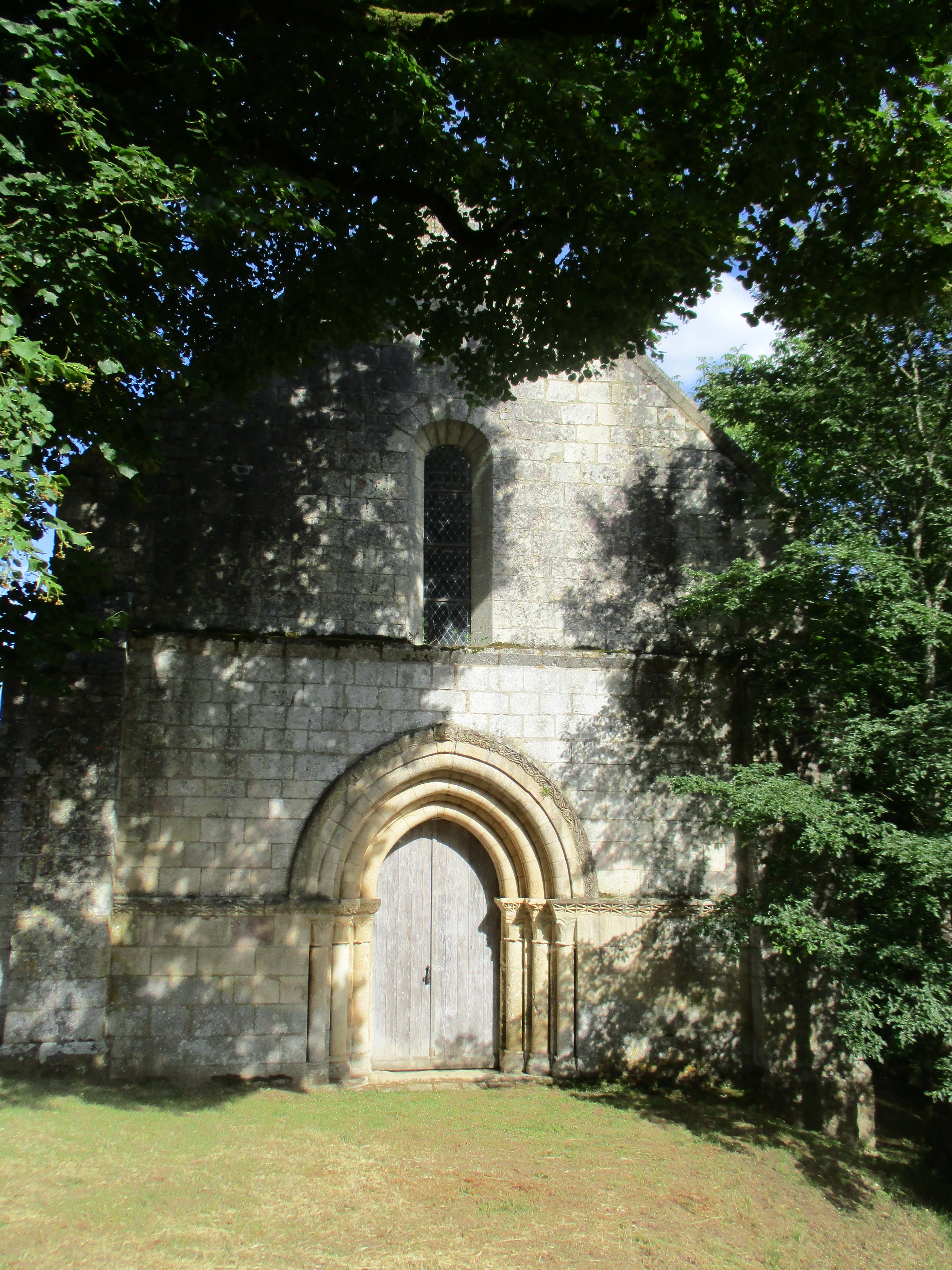 Façade de la chapelle romane de Plaincourault, exposée ouest.